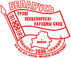 Беларуская (тарашкевіца): Штэмпель спэцгашэньня «Трэцi Ўсебеларускi народны сход»